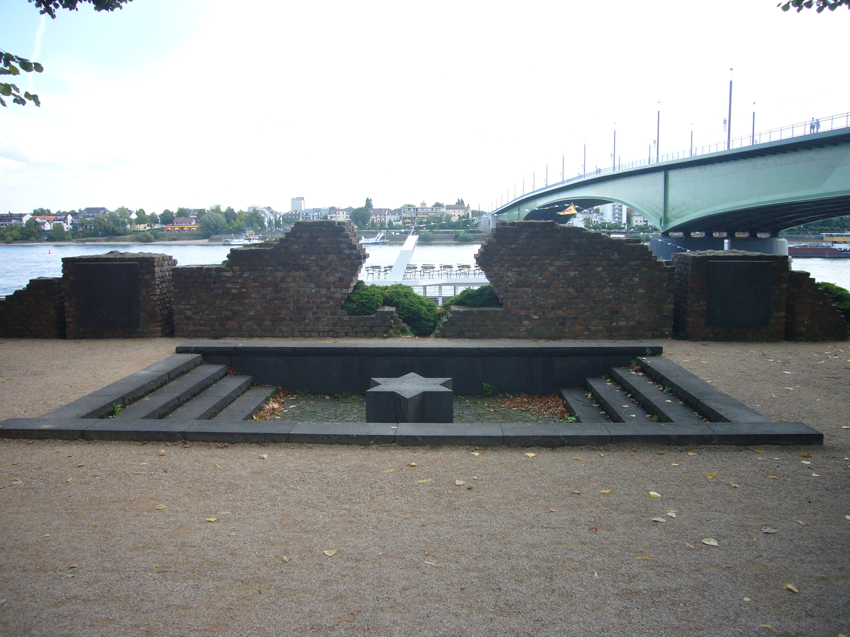 Mahnmal mit Ziegelresten des Fundaments der ehemaligen Synagoge, Moses-Hess-Ufer, Bonn-Zentrum